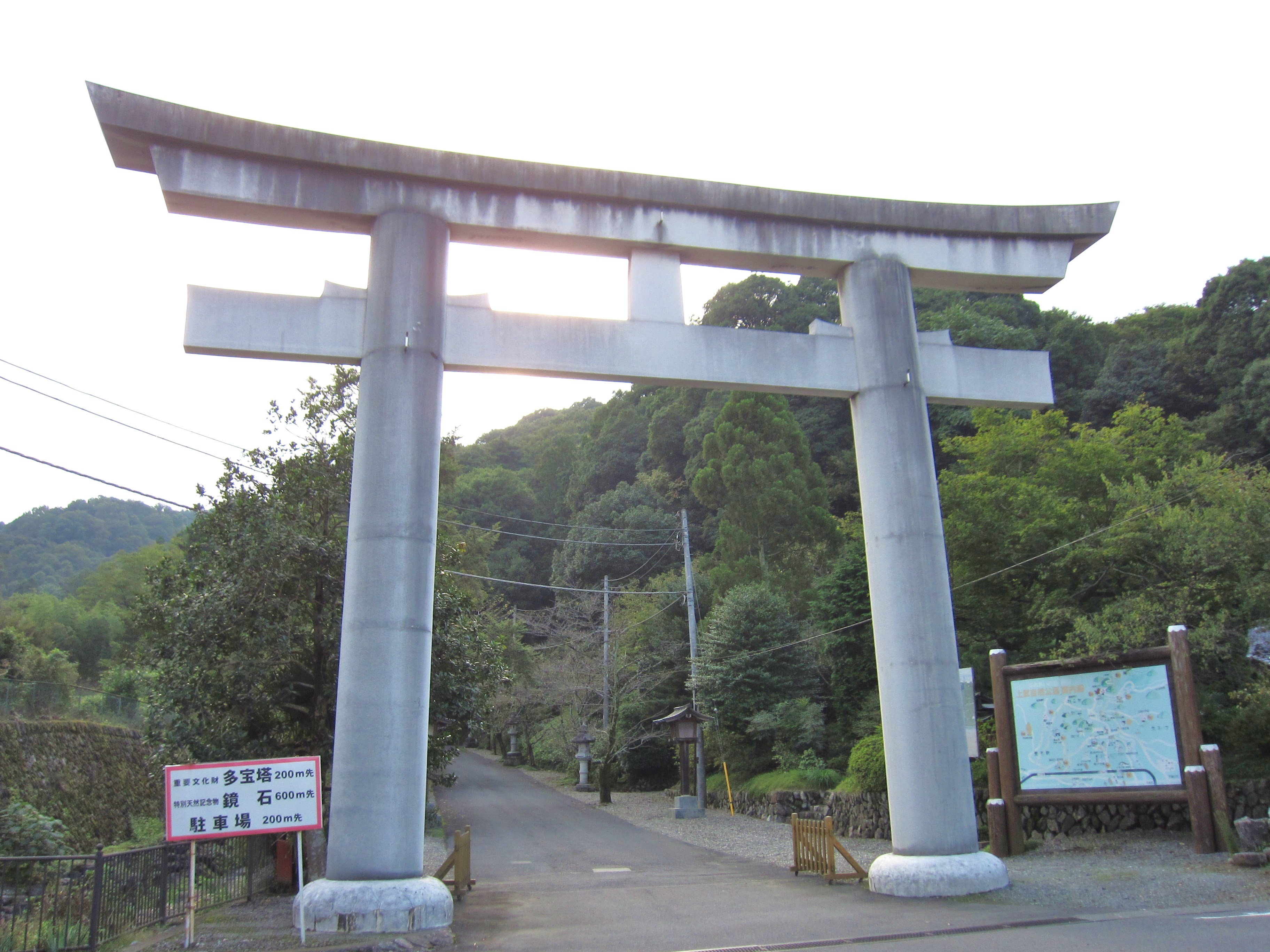 金鑚神社 大鳥居